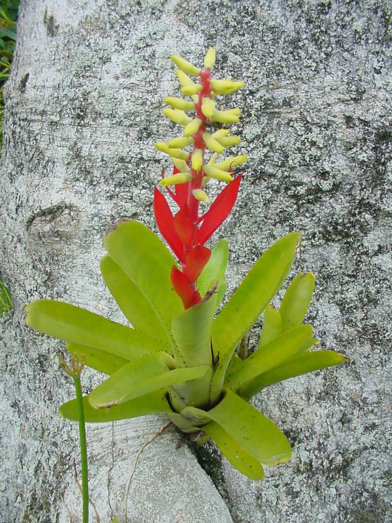 Aechmea nudicaulis - BROMELIACEAE Imbituba - SC - Brasil